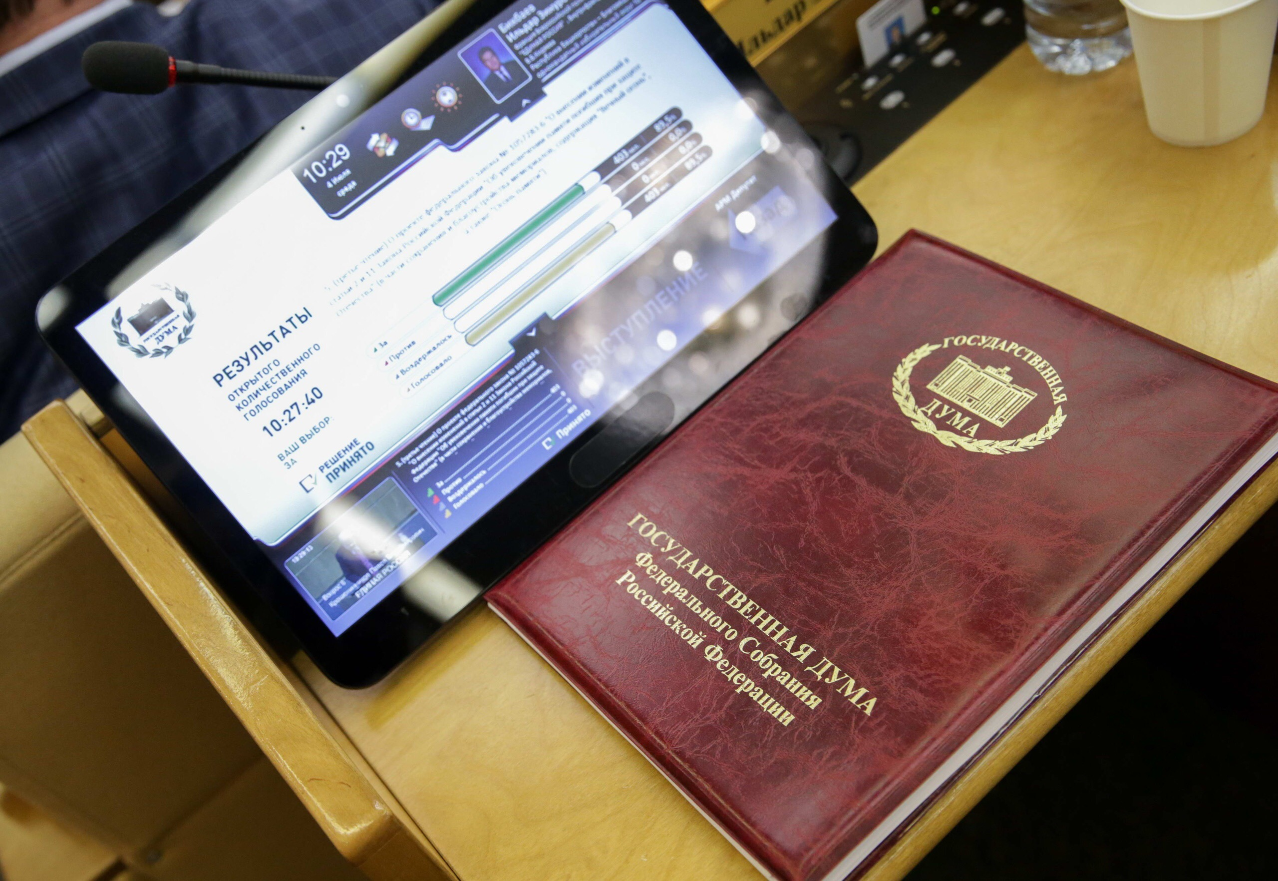 Устройство для голосования в Государственной думе